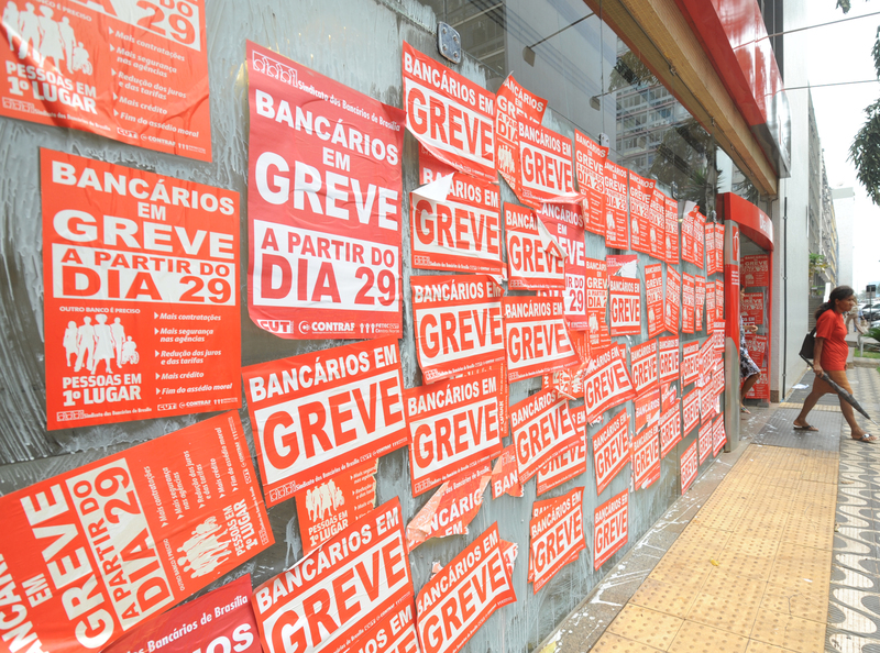 Bancários do Distrito Federal e de 24 estados iniciam greve por tempo indeterminado.